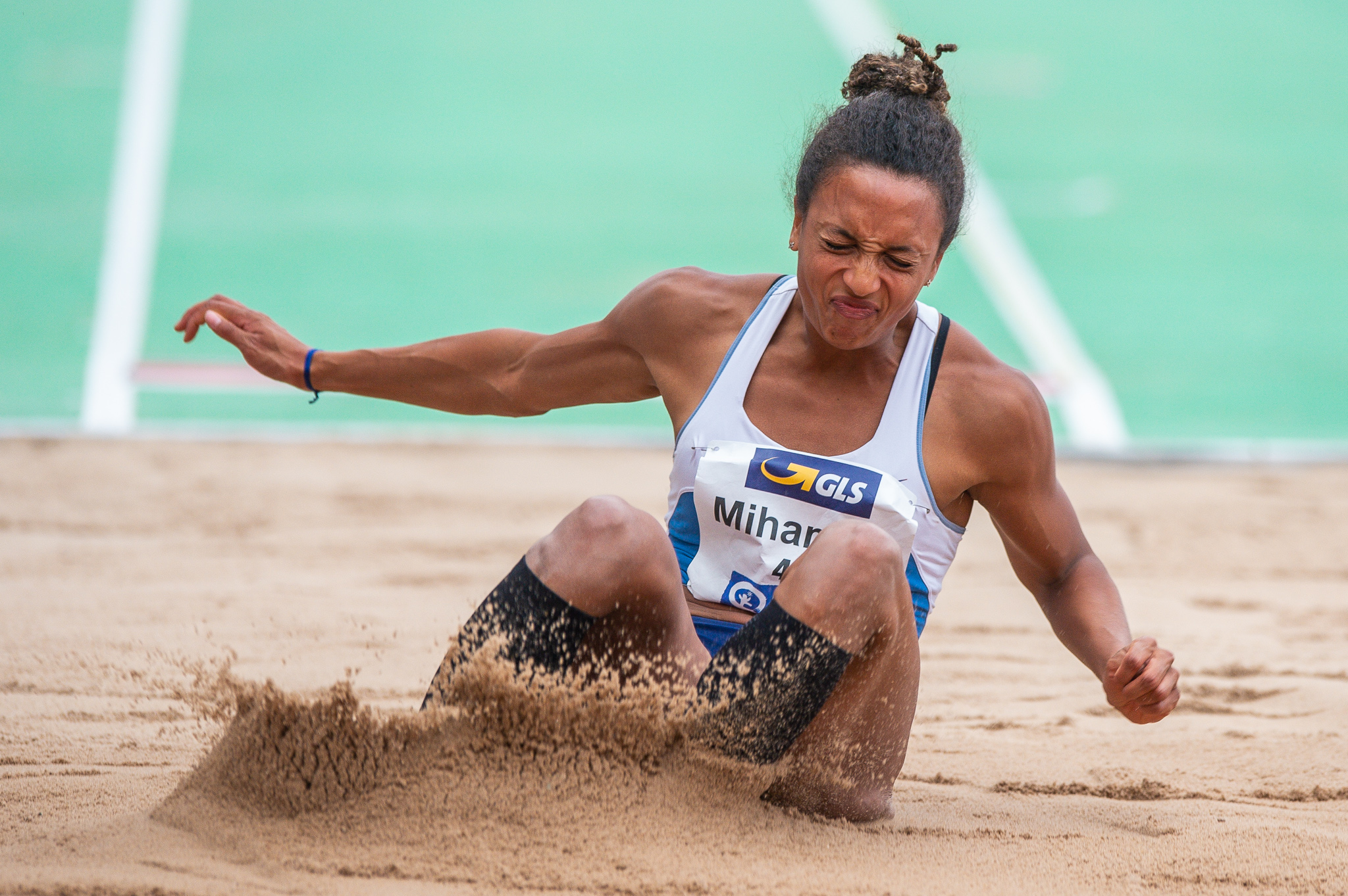 DLV,Deutsche Leichtathletik Meisterschaften 2018,Deutscher Leichtathletik-Verband,LG Kurpfalz,Long jump,Malaika Mihambo,Max-Morlock-Stadion,Weitsprung